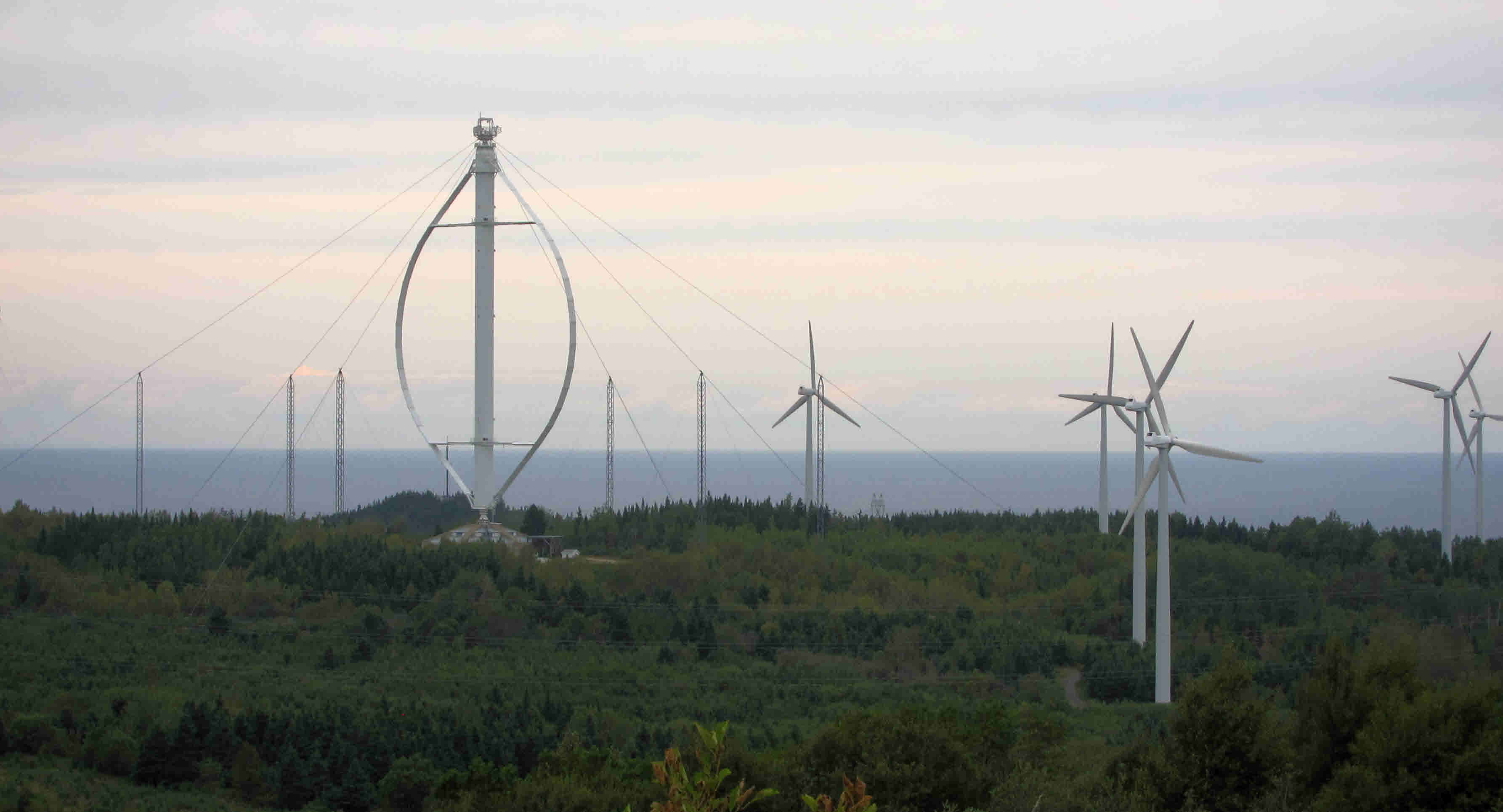 Éole, la plus haute éolienne à axe vertical au monde (110 m) située à Cap-Chat, Québec.